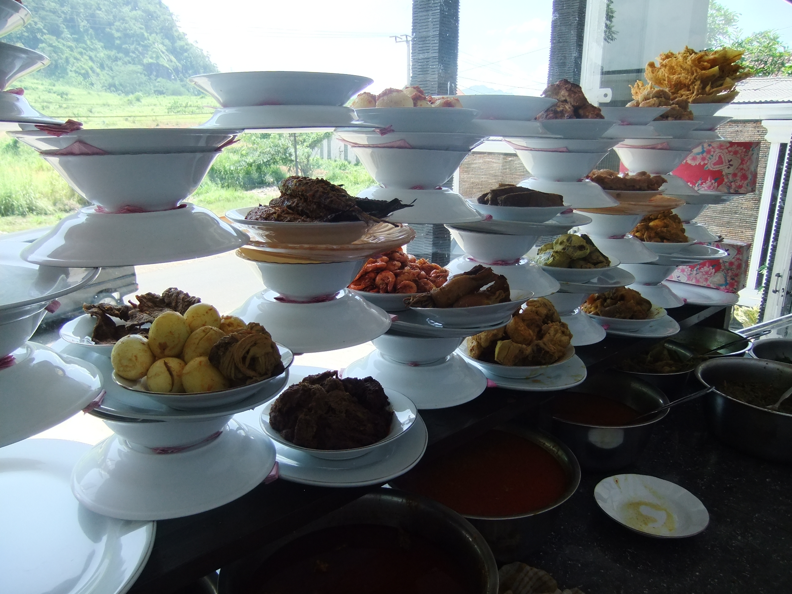 Hidangan restoran Padang di Sukabumi